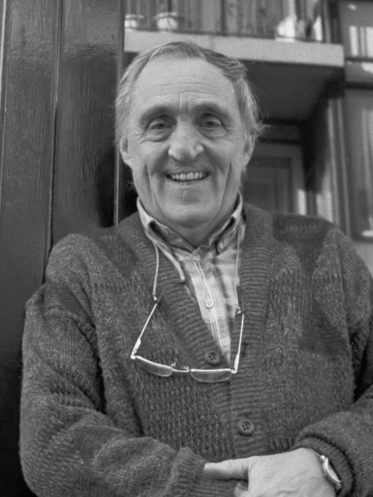 Pantomimespeler Rob van Reijn. Rob van Reijn poseert voor gevel 26 januari 1989